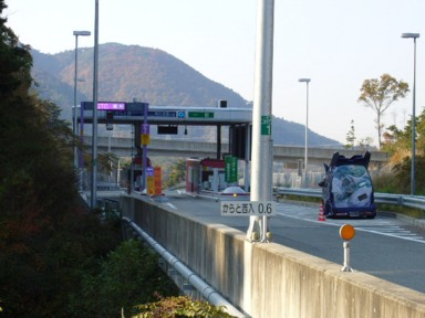 阪神高速7号北神戸線からと西出入口